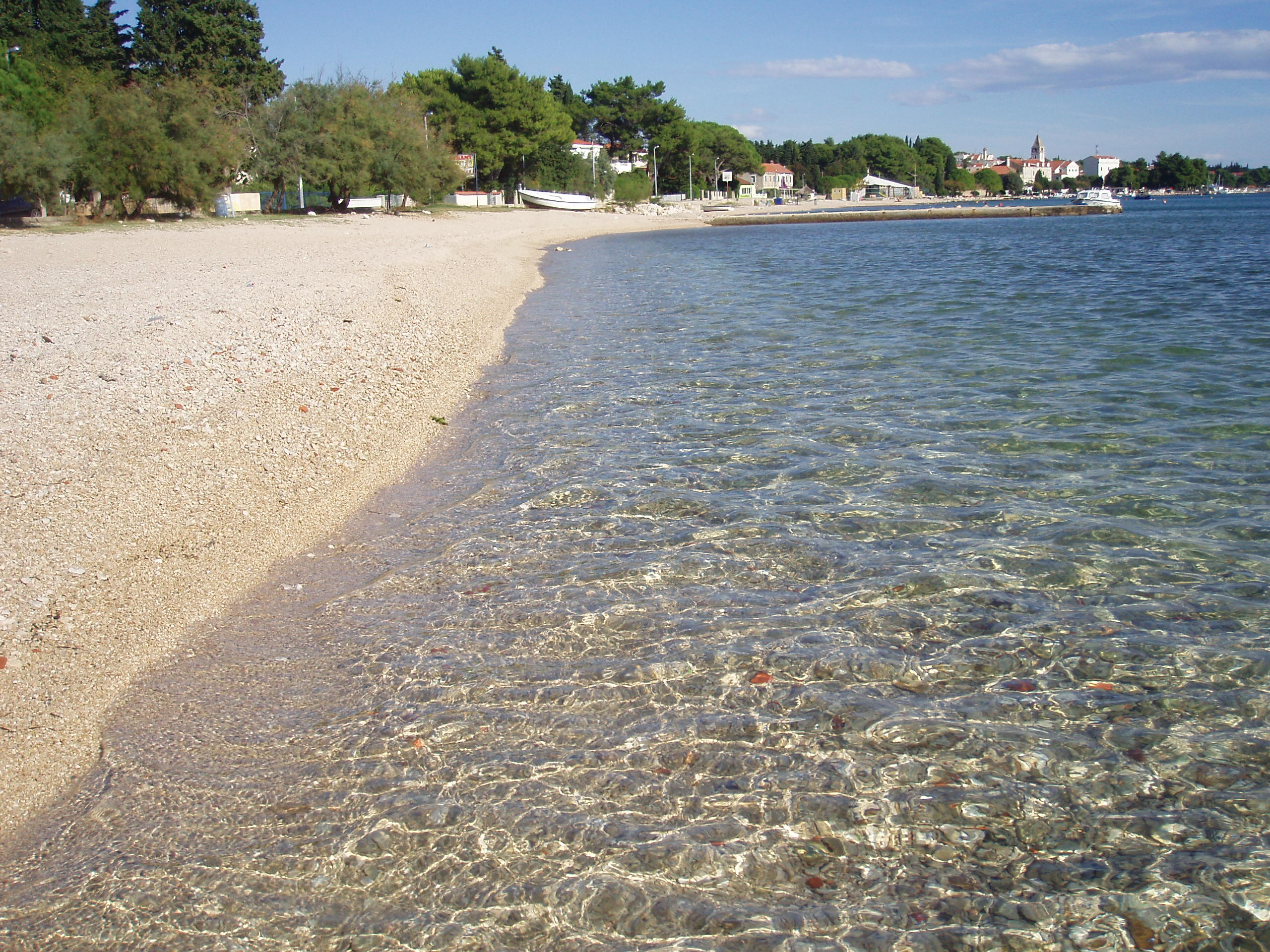 Sveti Filip I Jakov,pláž Croatia